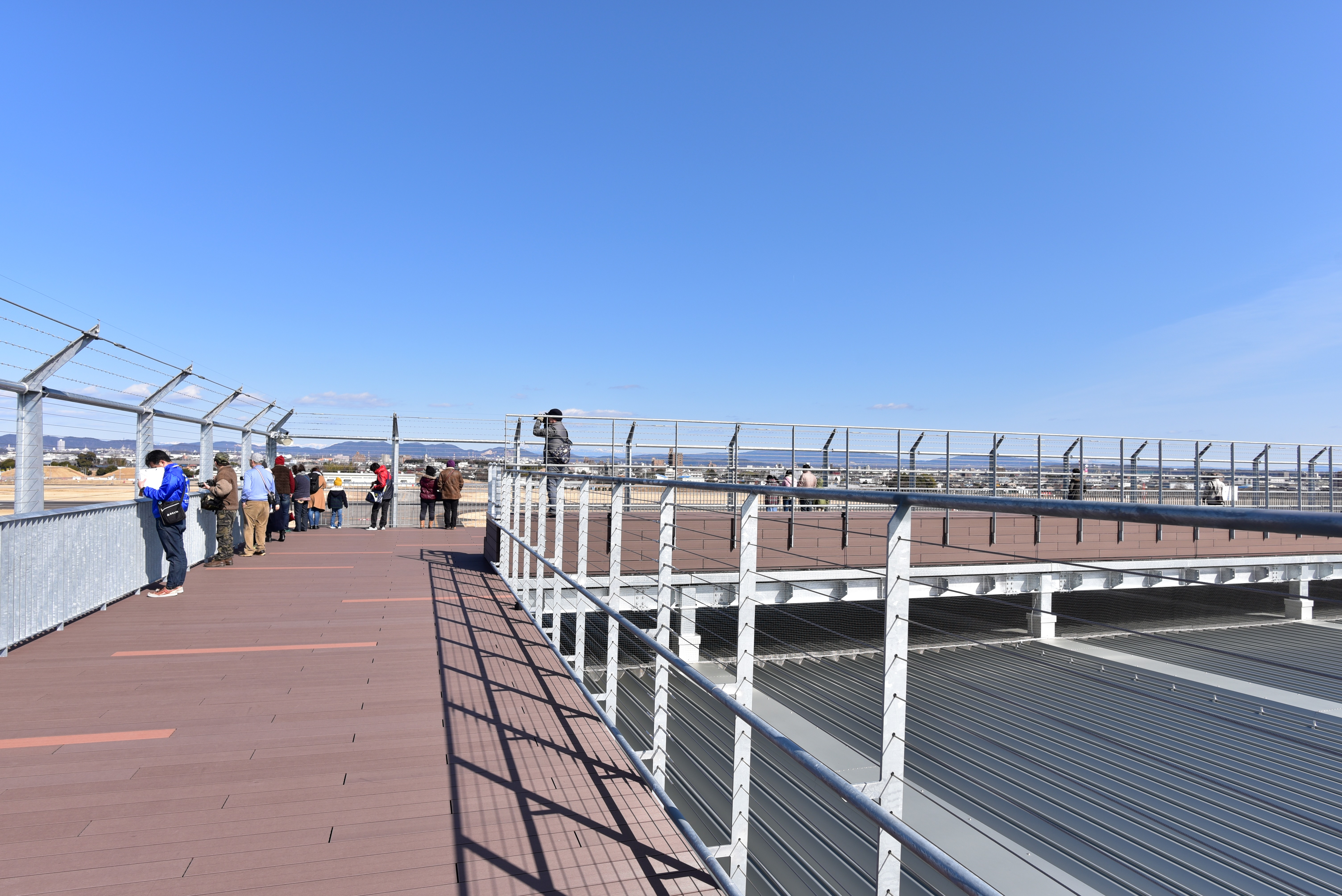 あいち航空ミュージアムの展望デッキ